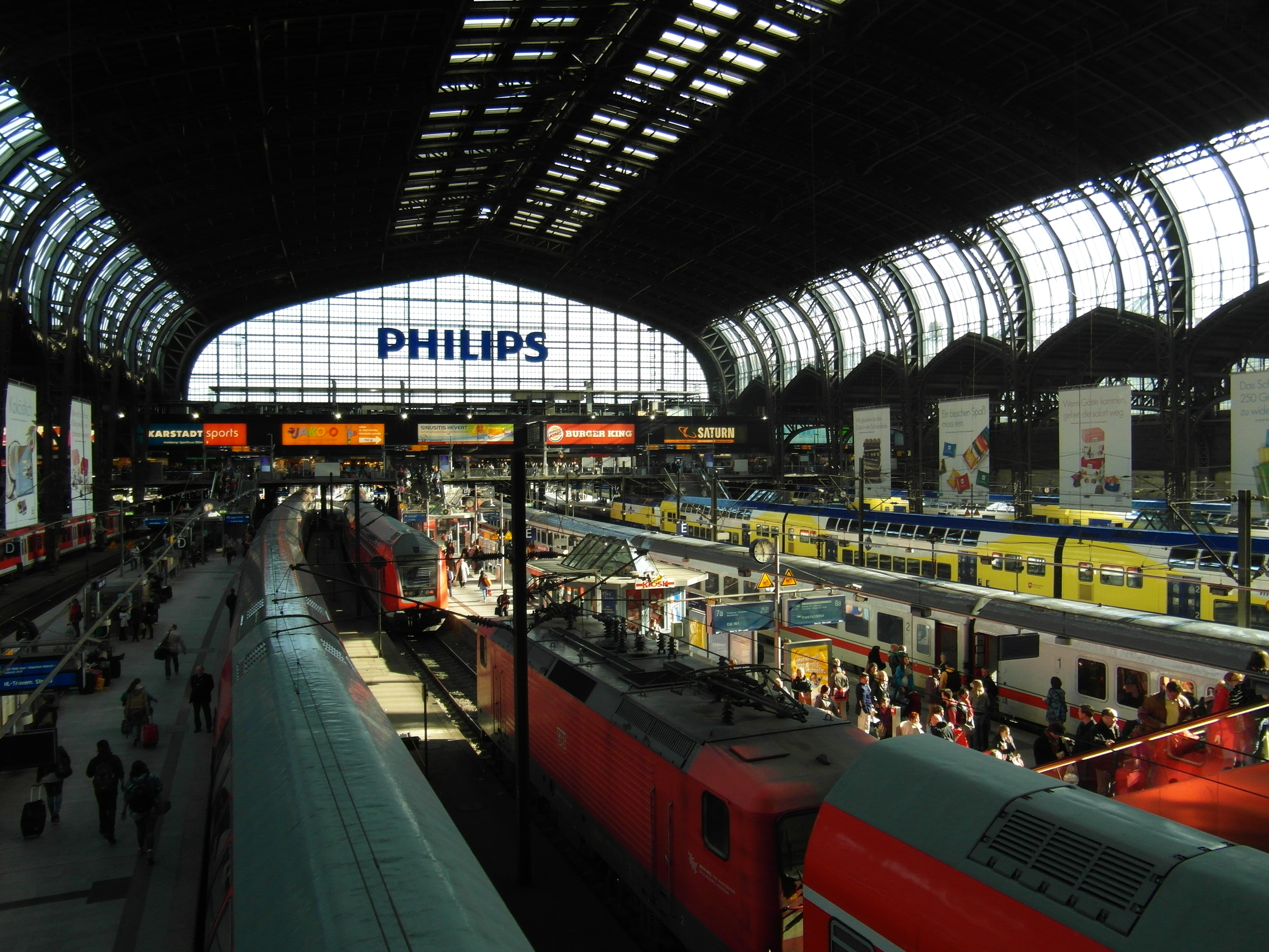 Hamburg Hauptbahnhof